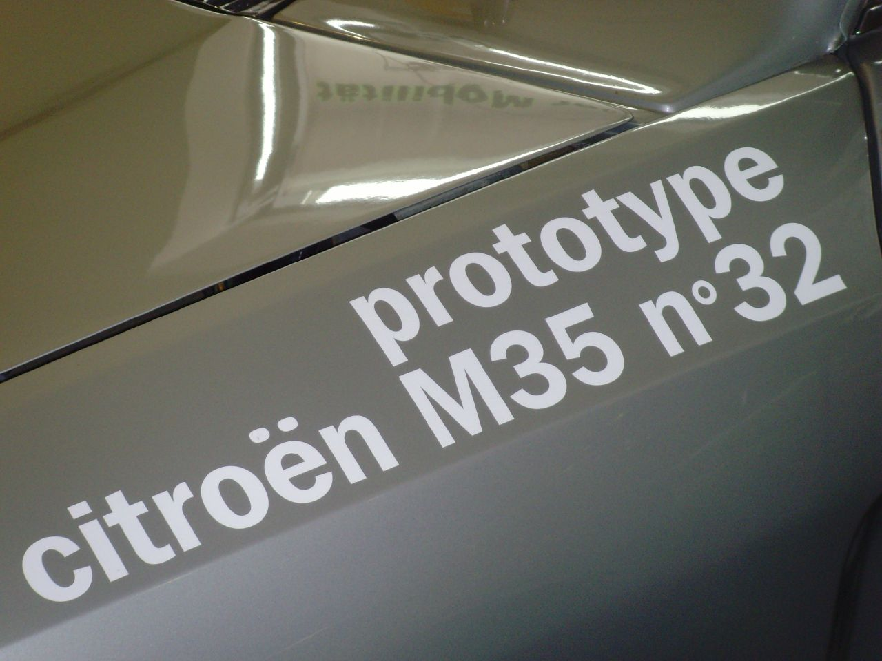 Museum AUTOVISION Tradition & Forum, Altlußheim